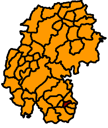 Friedersdorf hervorgehoben, Ilm-Kreis